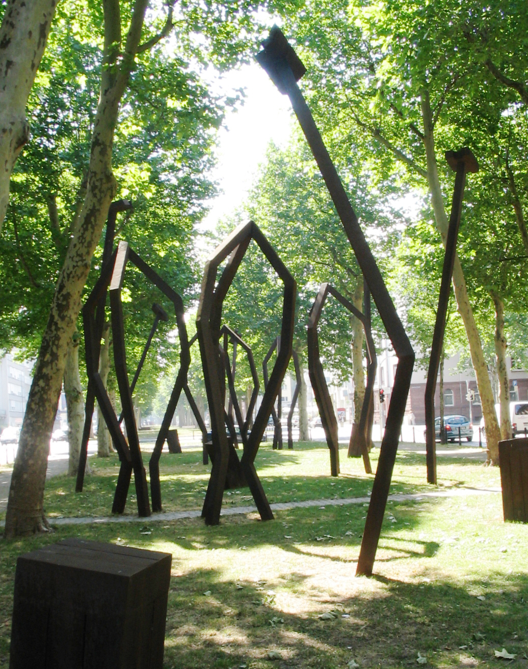 Mannheim, Augustaanlage, Robert Schad: „Eisenspiel für Mannheim“, 1993